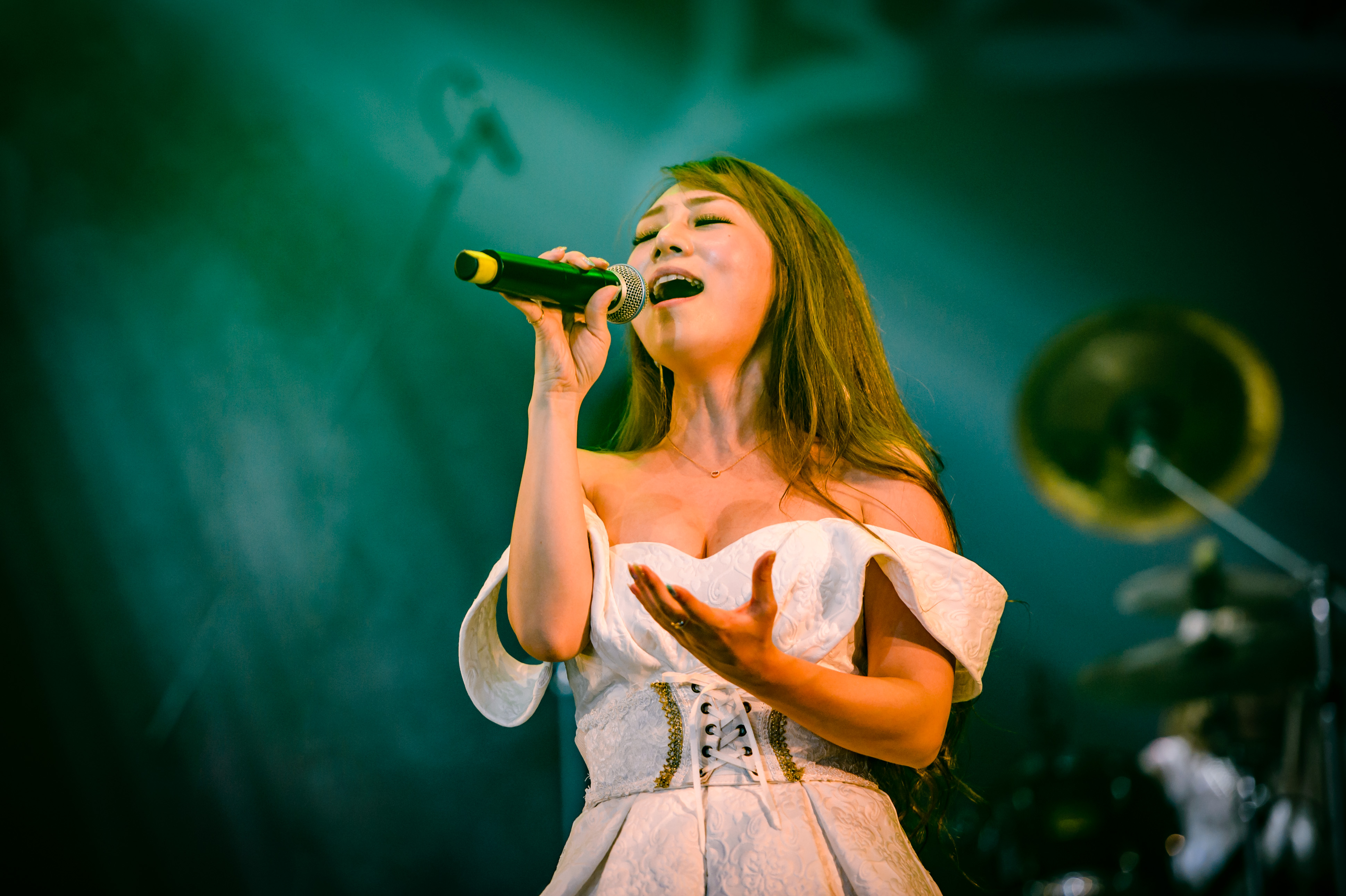 'Wacken Open Air 2018': 'Lovebites'